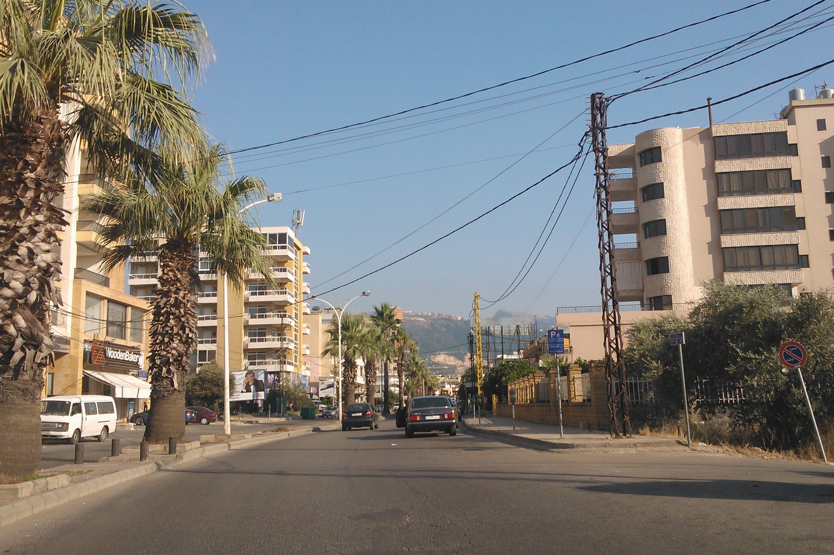 La route principale à Zghorta